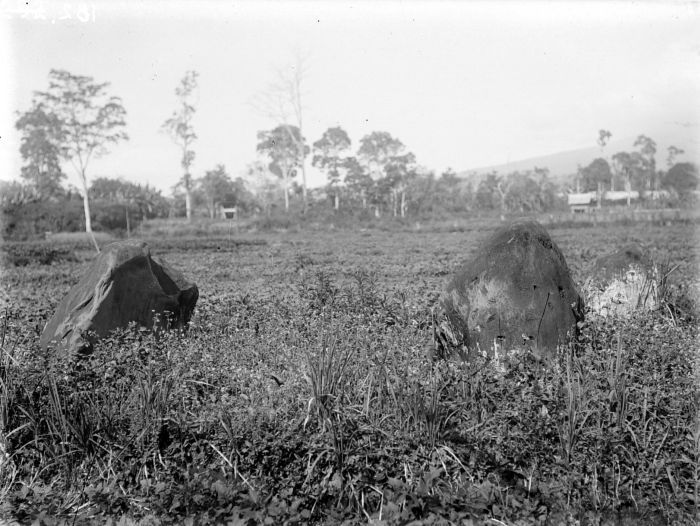 Negatief. Megalieten in een rijstveld bij Oedjanmas